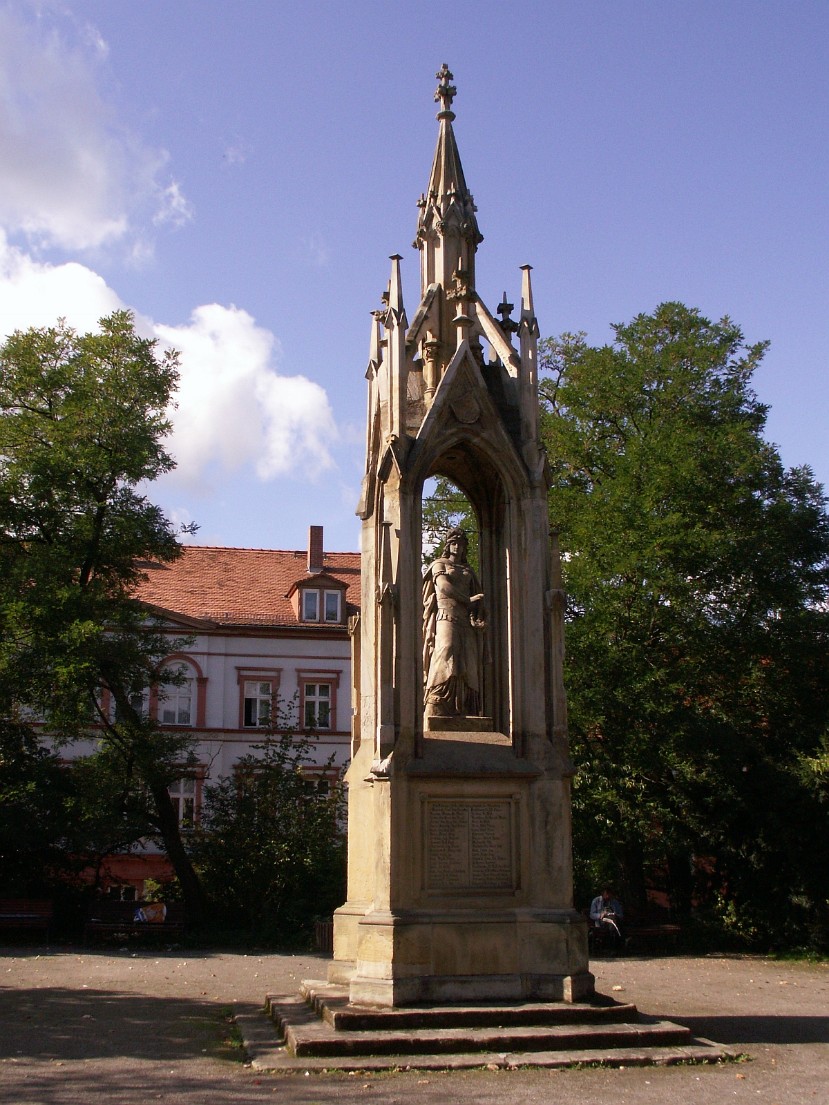 Naumburg an der Saale nahe Wenzelsring Ehrenmal für Gefallene Feldzug 1864 und 1870 1871. Foto von 2006.